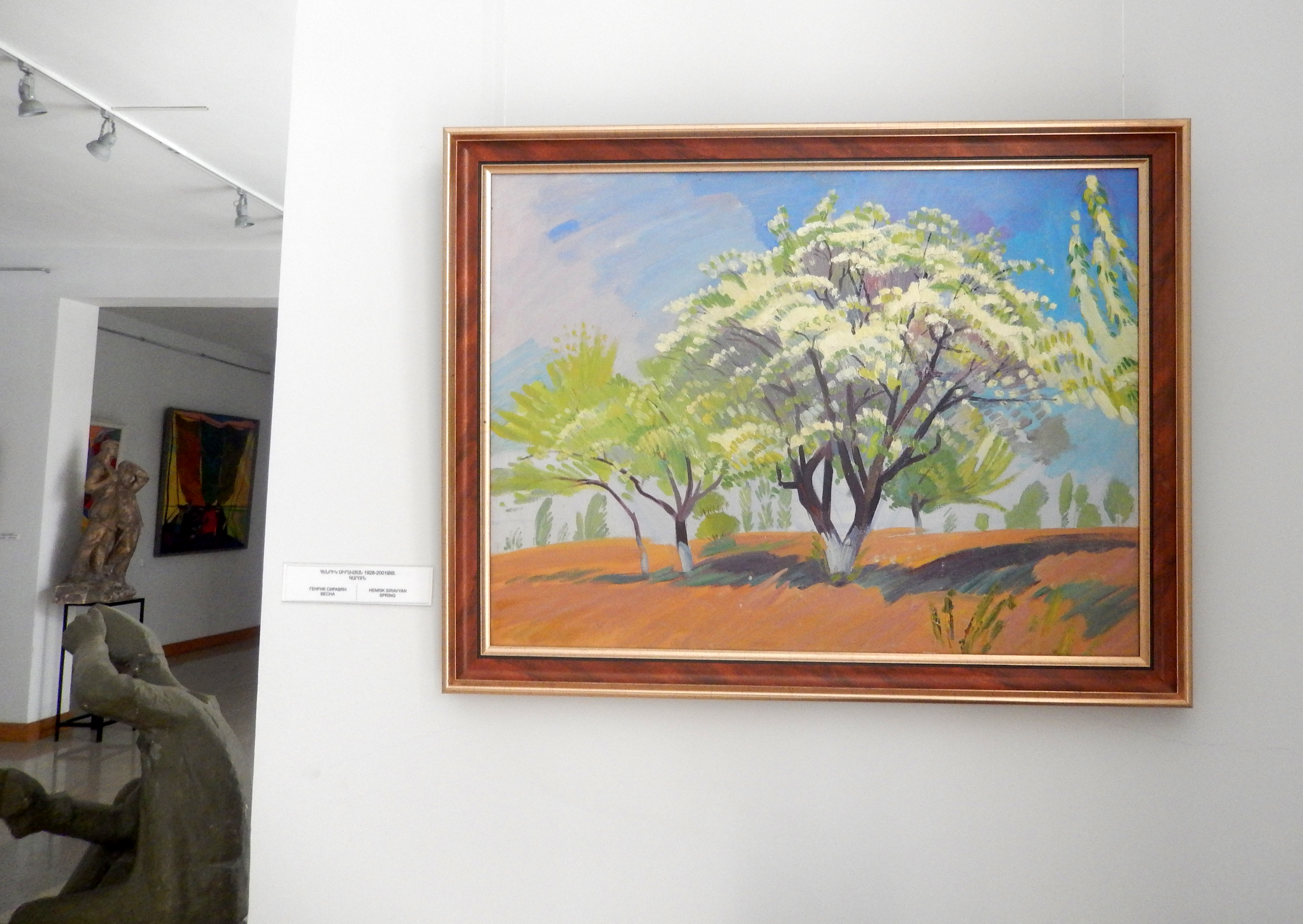 Դիլիջանի երկրագիտական թանգարան-պատկերասրահ The Geological Museum and Art Gallery of Dilijan 3/134